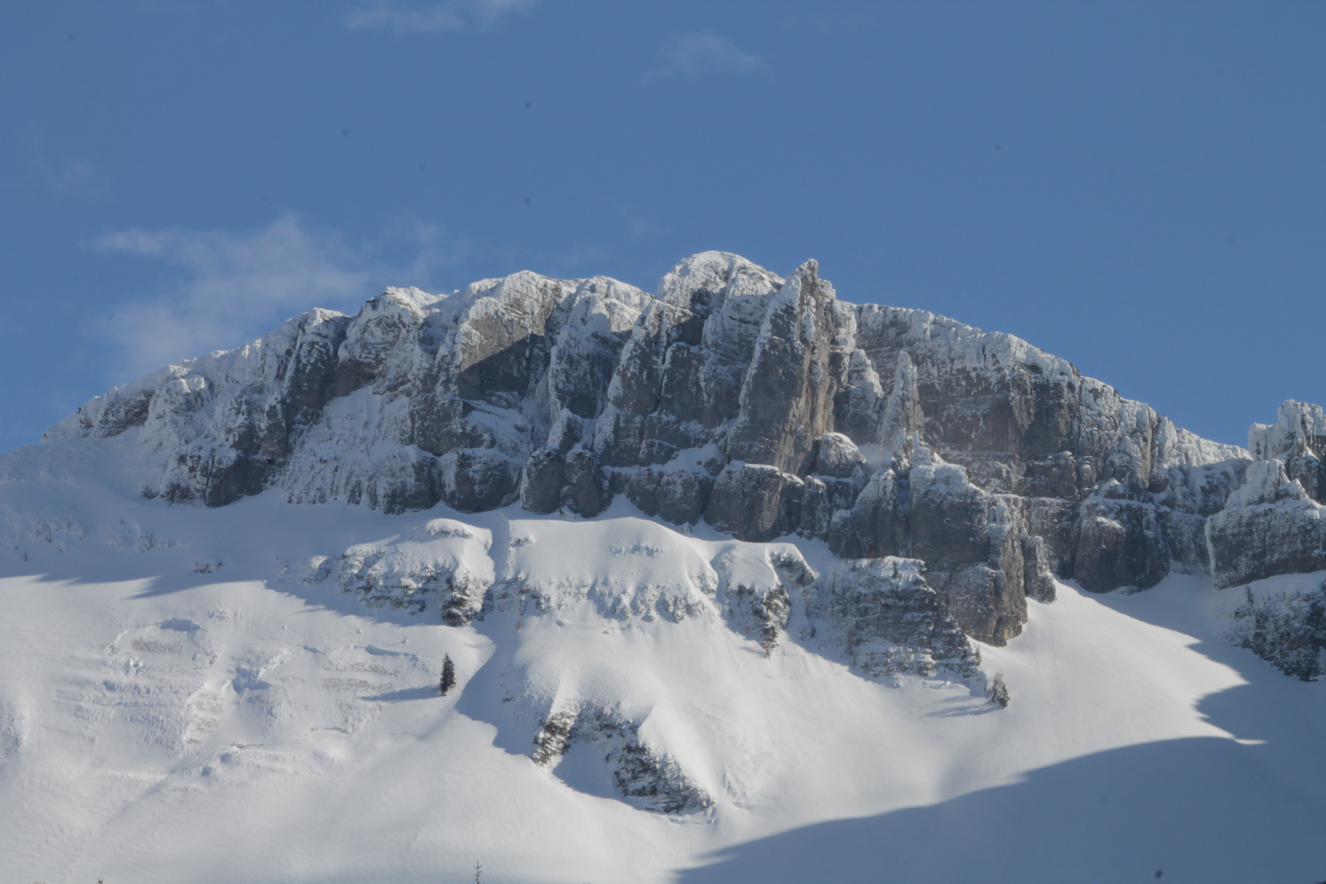 Greimuth von Blaa-Alm aus gesehen